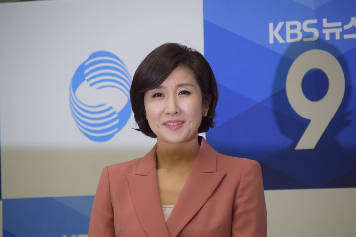 KBS 이소정 기자